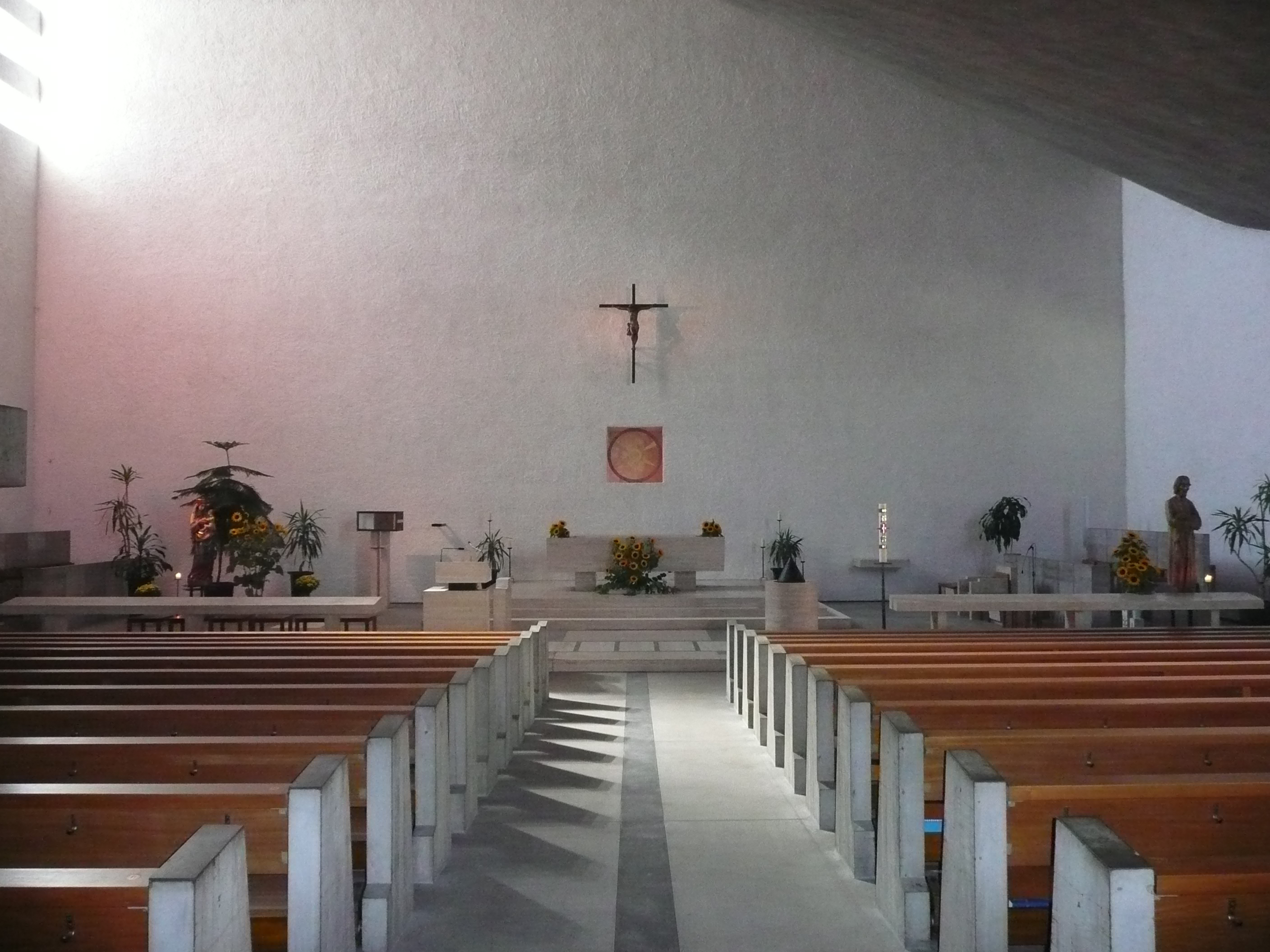 Innenraum der Bruder-Klaus Kirche Winkeln